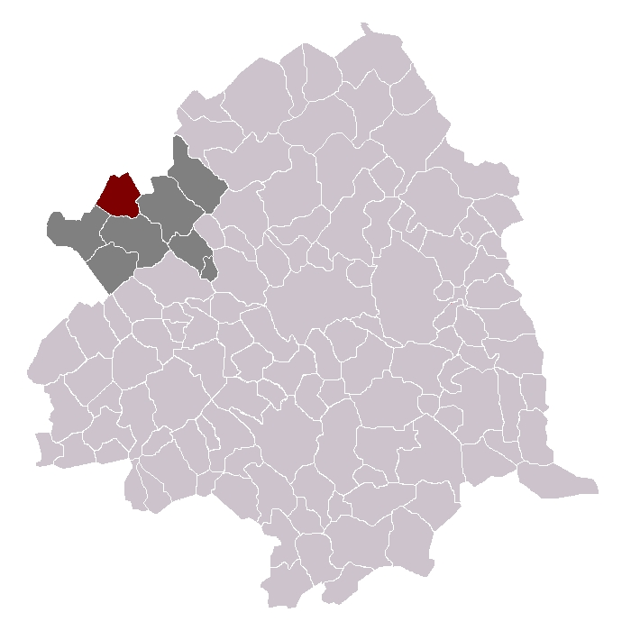 Armentieres par rapport à son canton et a l'arrondissement de Lille